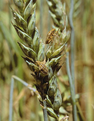 Xinxes en blat tou.